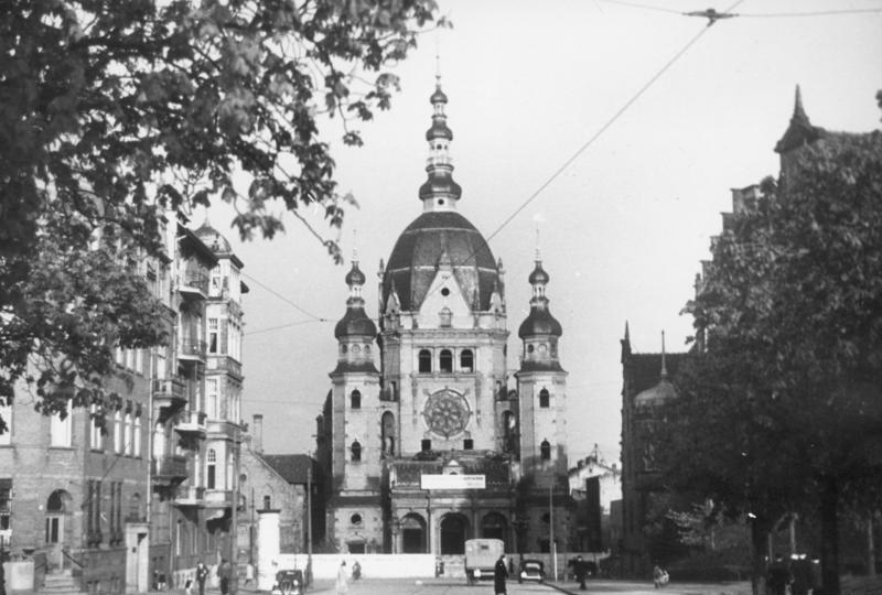 Danzig.- Die Synagoge, Reitbahn - Abbrucharbeiten 1.5.1939